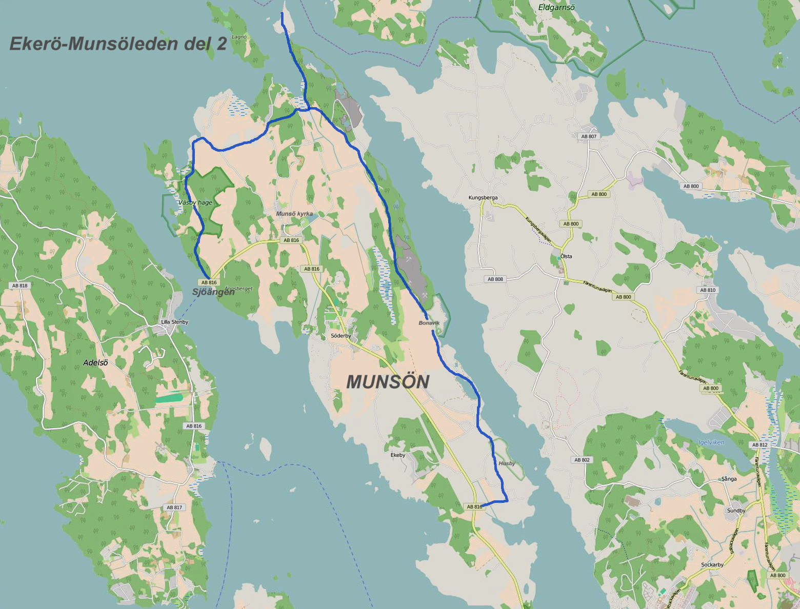 Ekerö-Munsöleden Del 2, bakgundskartan är från Open Street map